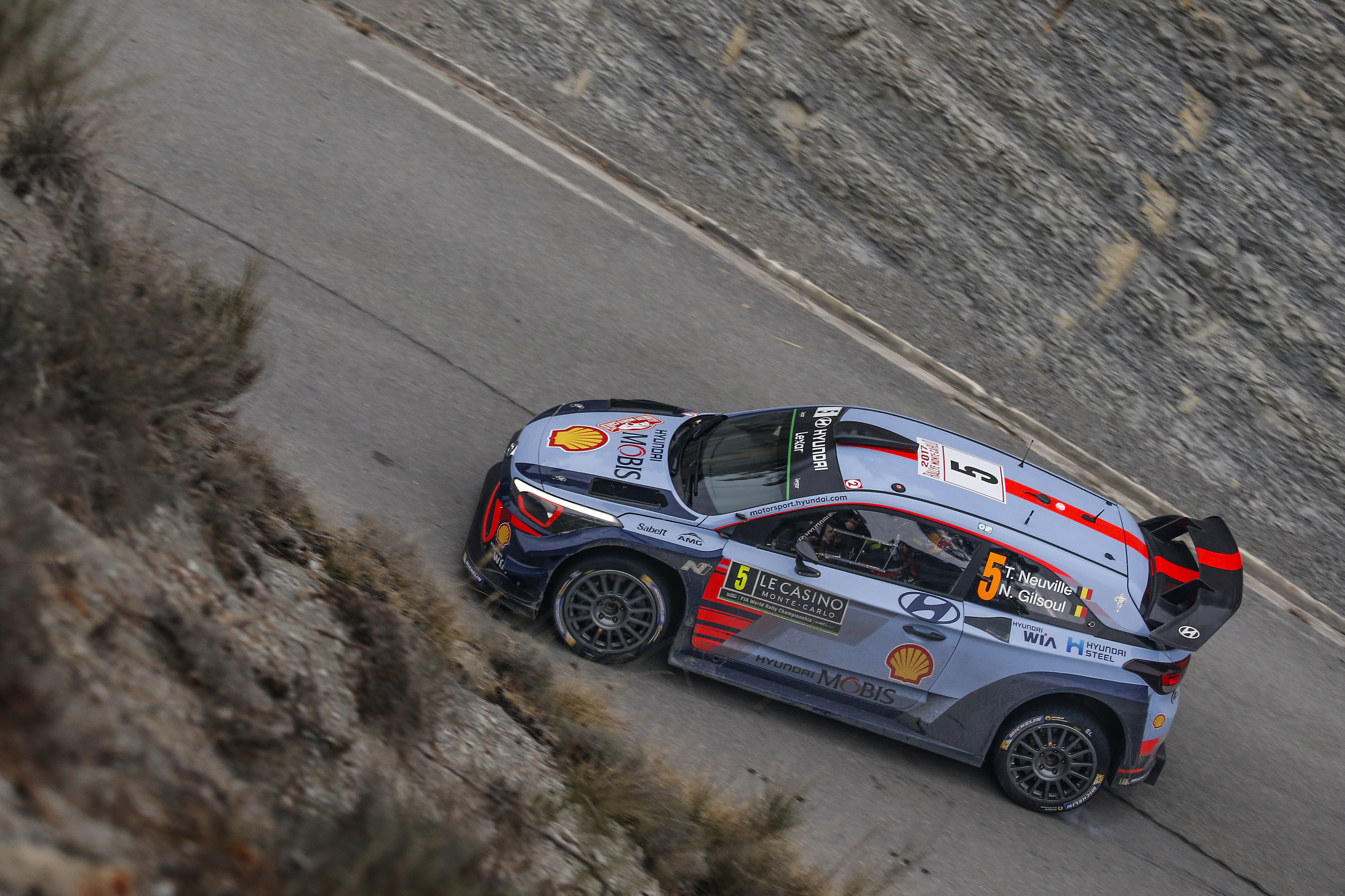 Thierry Neuville podczas Rajdu Monte Carlo 2017